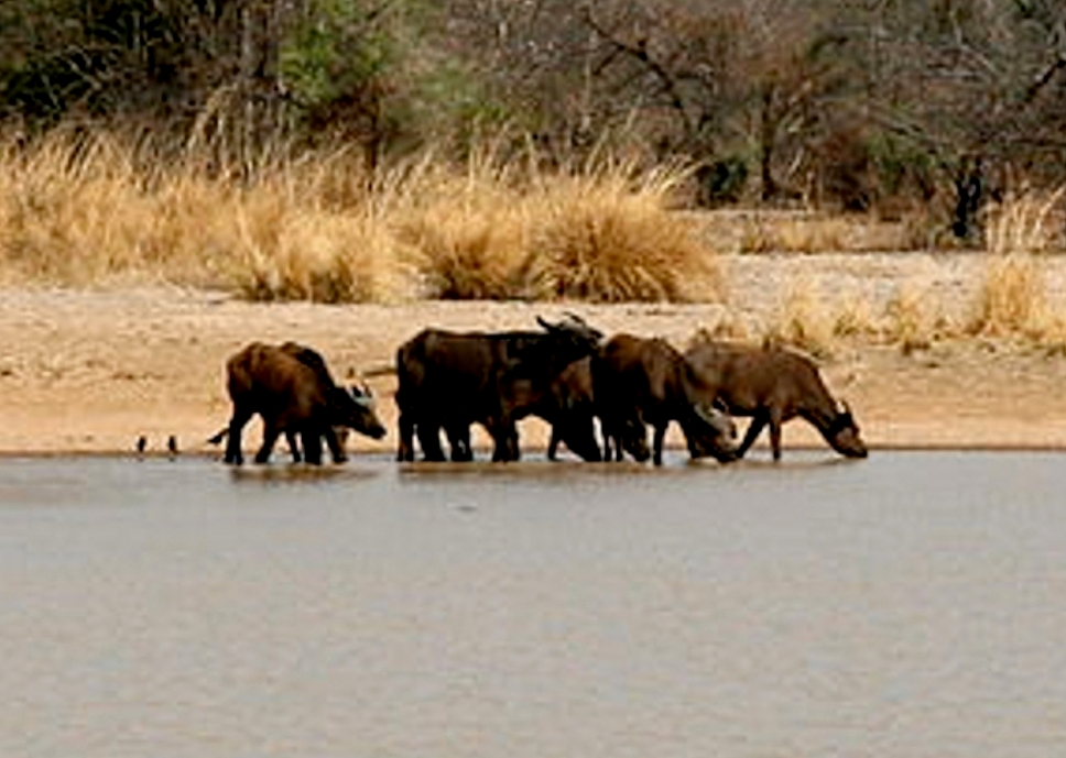 Pendjari Nationalpark, Benin